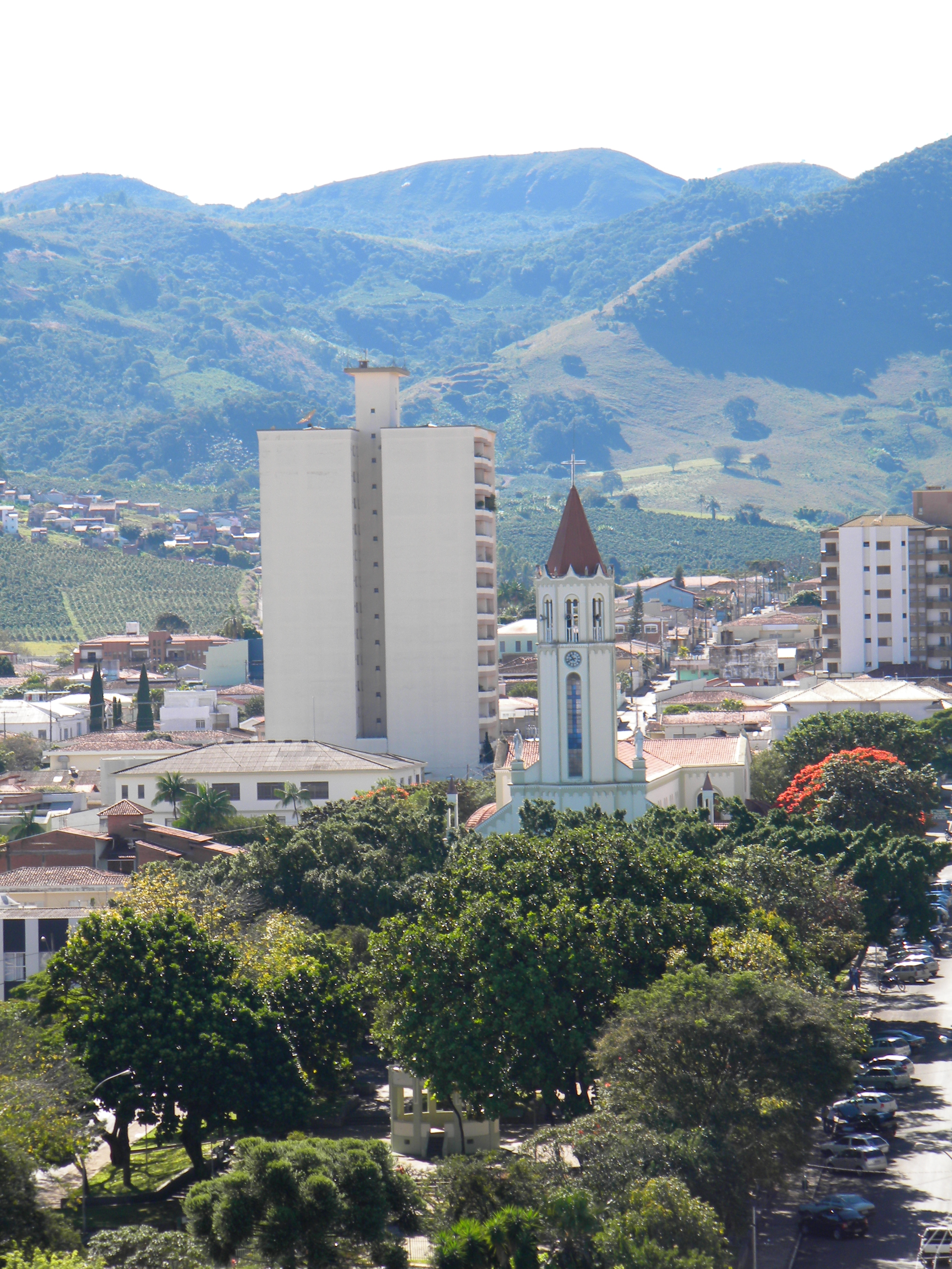 Praça Doutor Alcides Mosconi